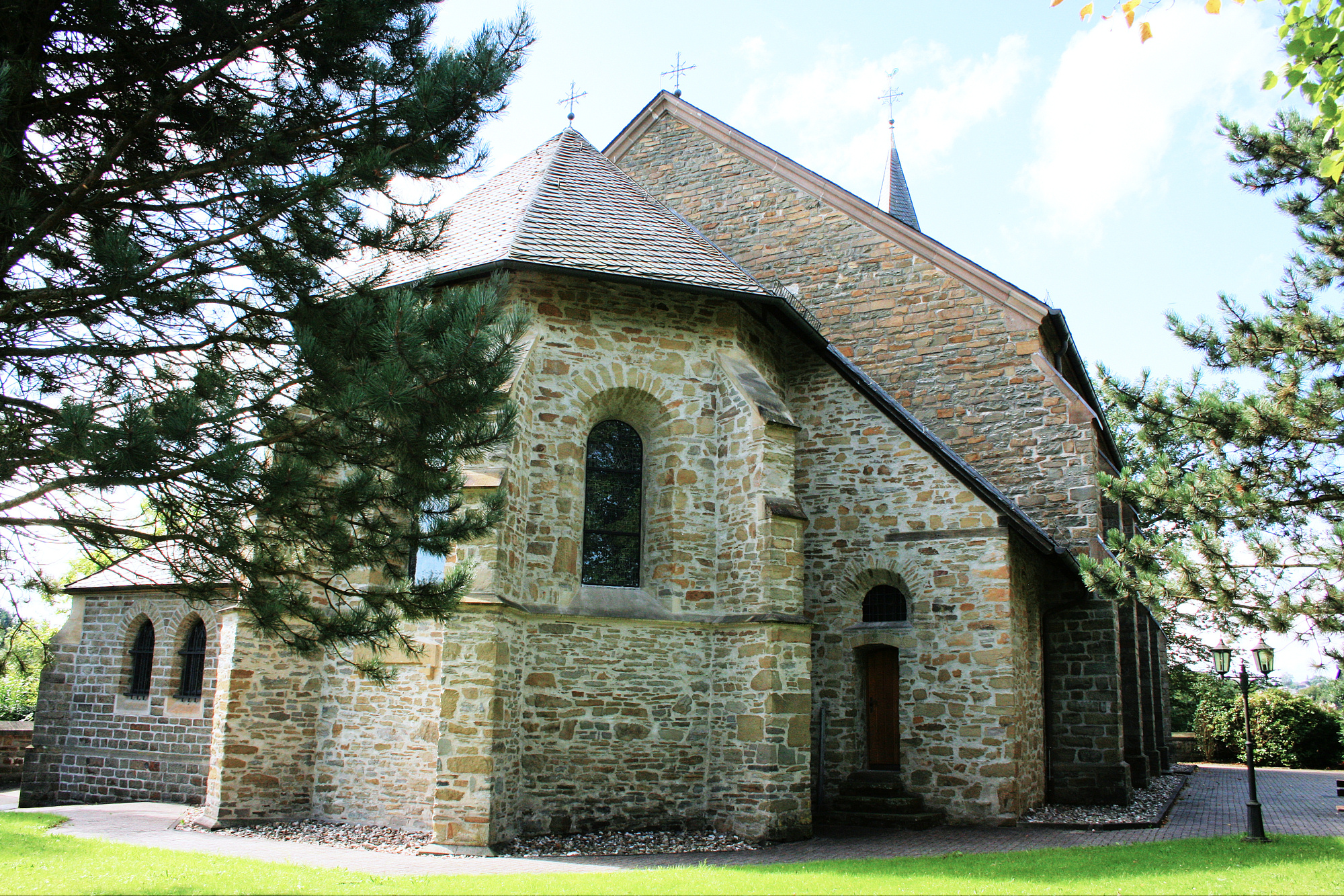 Kirche Ruppichteroth-Schönenenberg